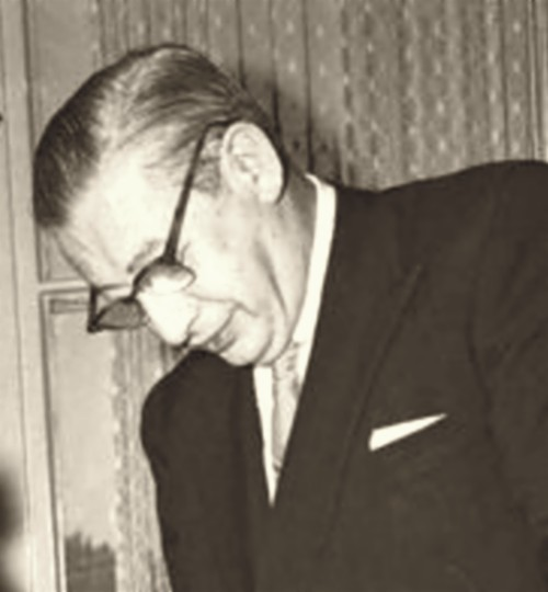 O empresário teatral William "Billy" Rose (1899 – 1966), em 1960.